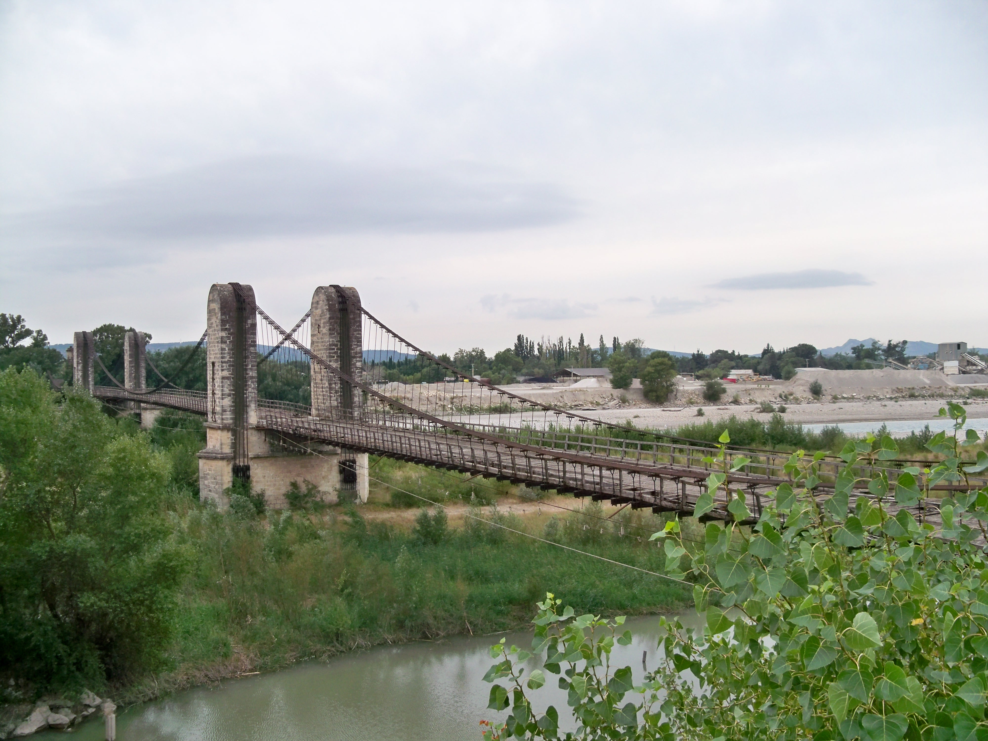 Pont suspendu sur la Durance entre Mallemort (Bouches-du-Rhône) et Mérindol (Vaucluse), France